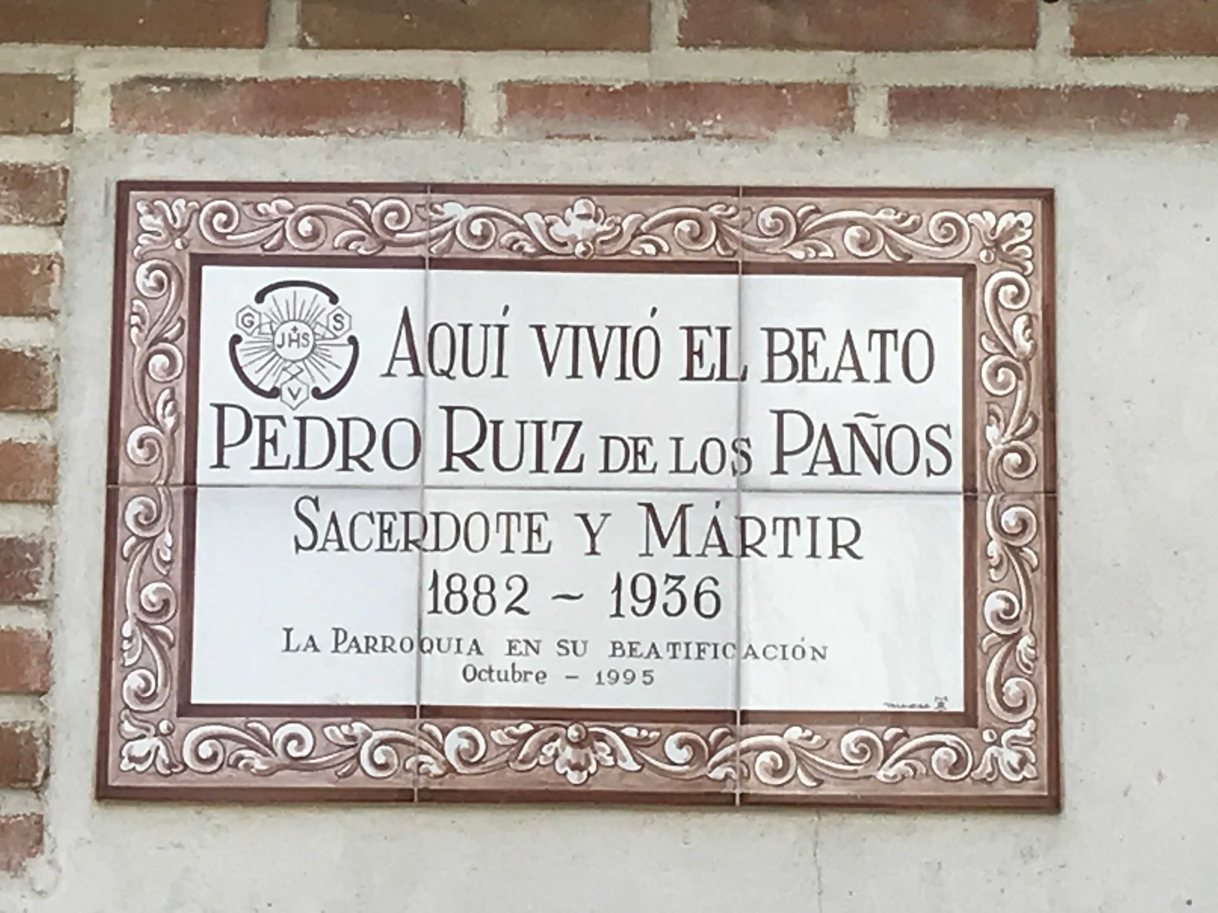 Placa homenaje en La Calzada